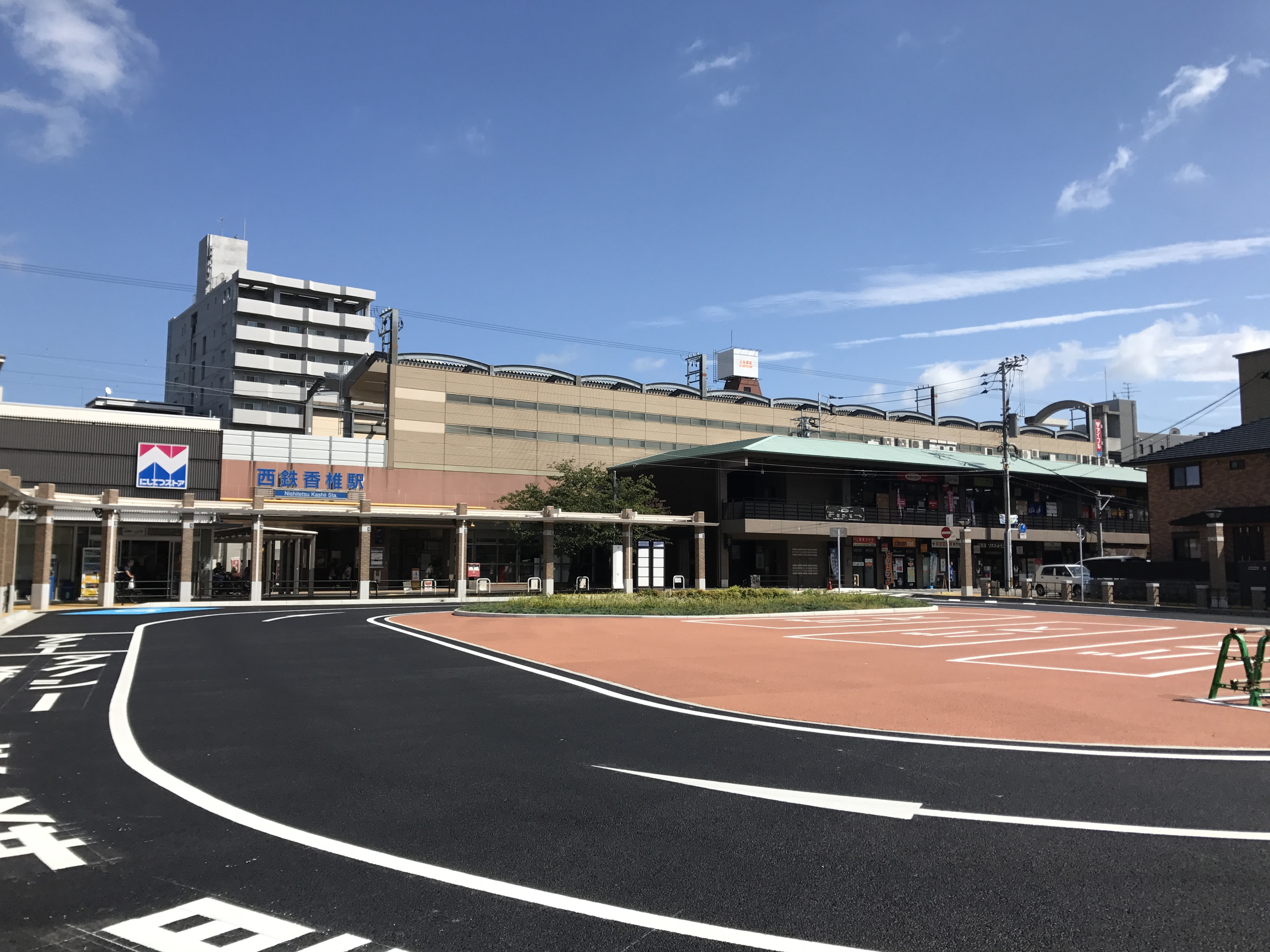 西鉄香椎駅の遠景